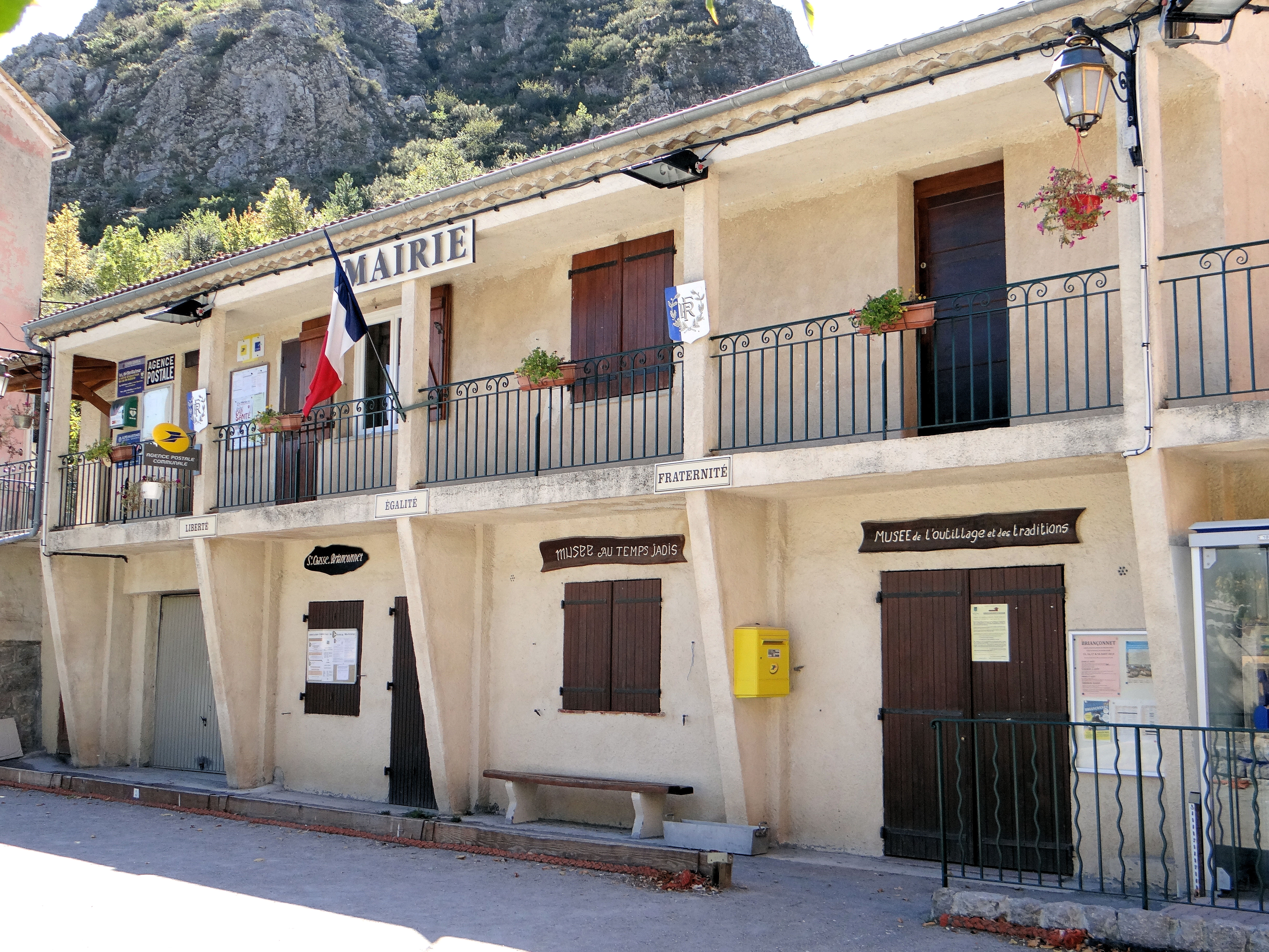 Briançonnet - Mairie et musée de l'outillage